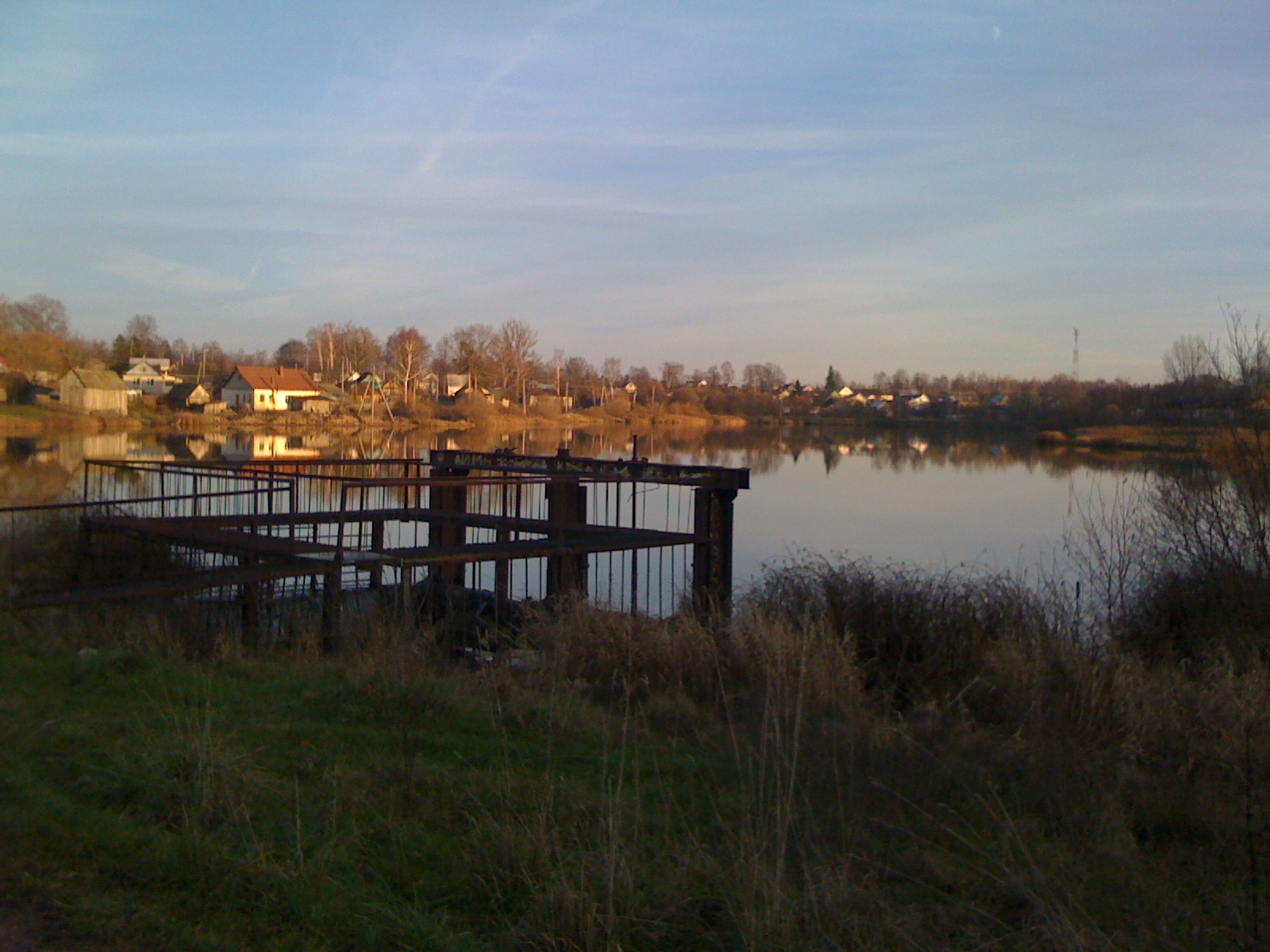 Дамба